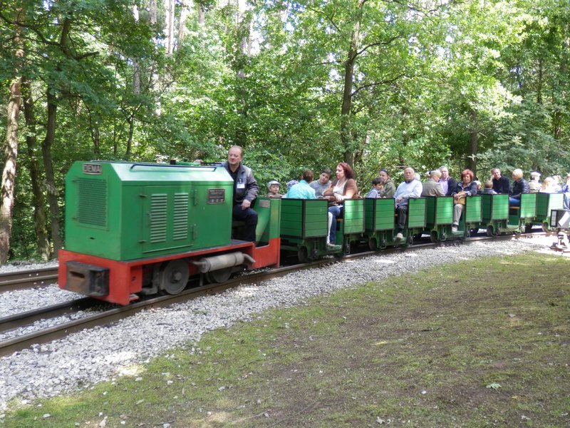 Schöma-Diesellok und Wagen der alten Nürnberger Tiergartenbahn im Feldbahnmuseum 500 in Nürnberg